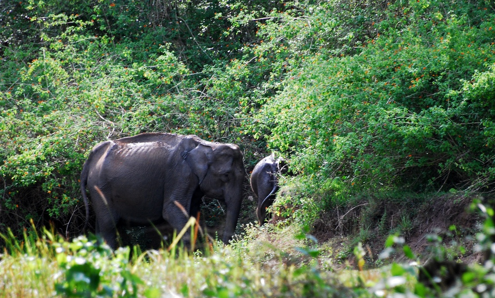 കേരളത്തിലെ ഒരു വന്യജീവി സം‌രക്ഷണകേന്ദ്രമാണ്‌ വയനാട് വന്യജീവി സം‌രക്ഷണകേന്ദ്രം. കേരളത്തിലെ വയനാട് ജില്ലയിലെ സഹ്യപർവ്വതത്തോടു ചേർന്നുകിടക്കുന്ന ഈ വന്യജീവി സംരക്ഷണ കേന്ദ്രം ഇവിടത്തെ ആനകൾക്കും പുലികൾക്കും പ്രശസ്തമാണ്. നീലഗിരി ജൈവമണ്ഡലത്തിന്റെ ഭാഗമായ ഇത് 1973-ലാണ് ഒരു വന്യജീവി സംരക്ഷണ കേന്ദ്രമായി പ്രഖ്യാപിക്കപ്പെട്ടത്